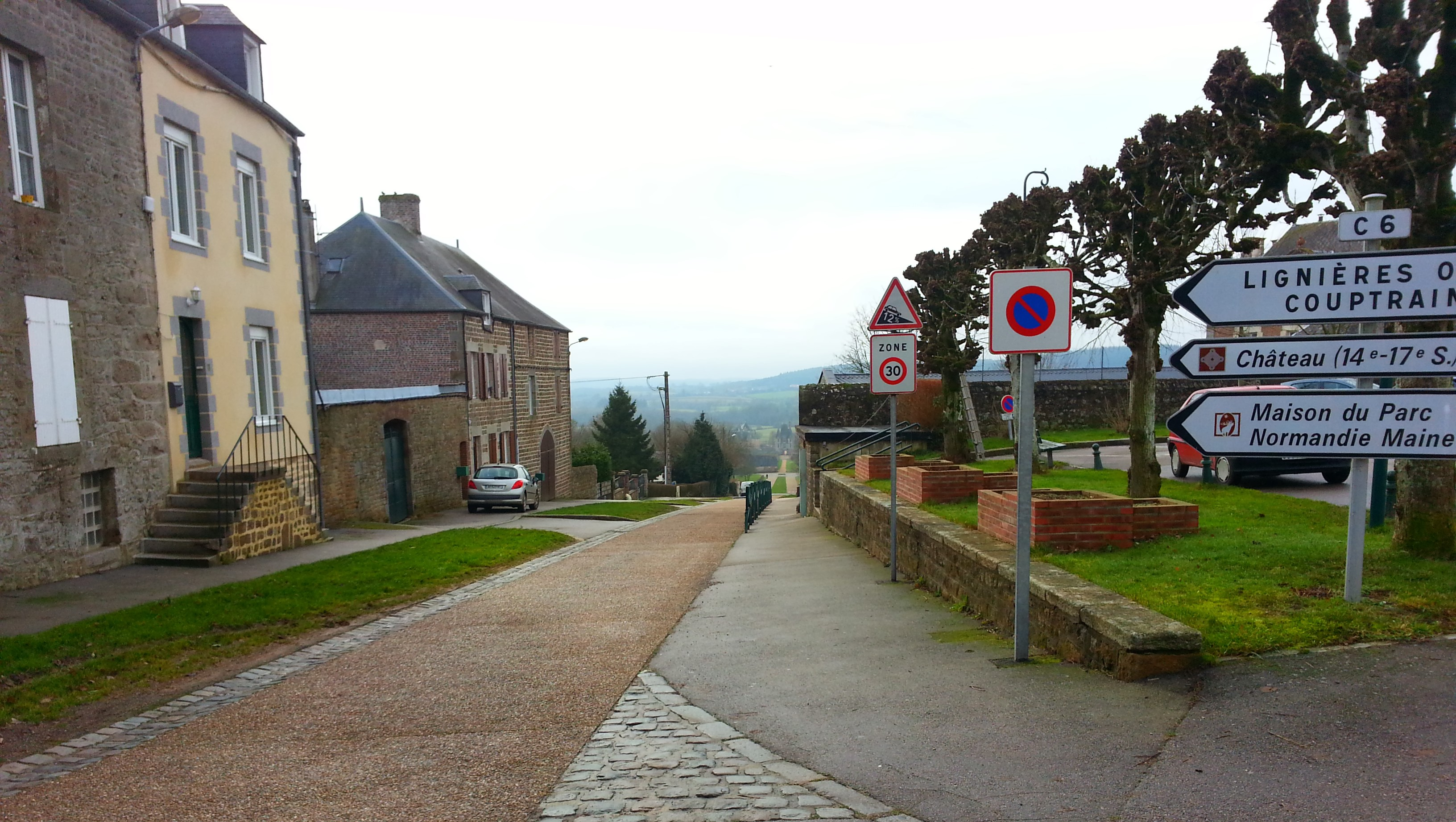 Le village de Carrouges, avec la route impressionnante qui le relie au château